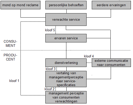 Het Gap-model van Zeithaml (1990) waarbij de 5 Gaps het verschil tussen 2 factoren weergeven